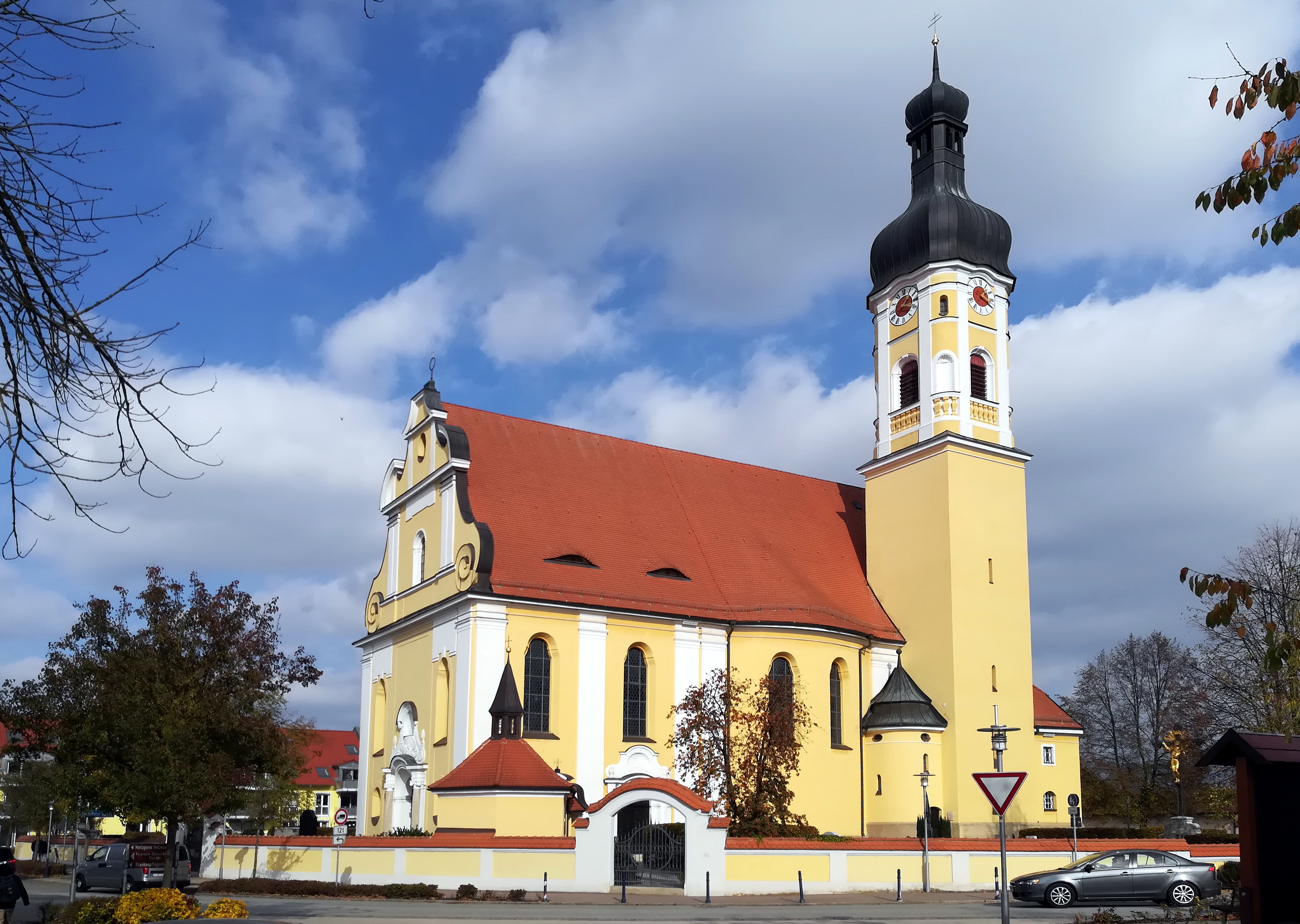 Pfarrkirche St. Georg in Obertraubling